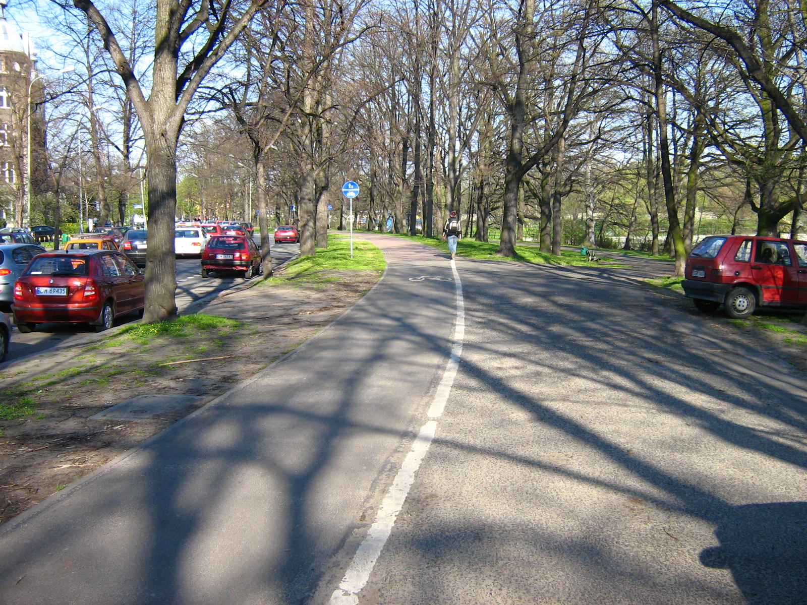 Bicycle path (ścieżka rowerowa), Wybrzeże Wyspiańskiego, Wrocław, Poland